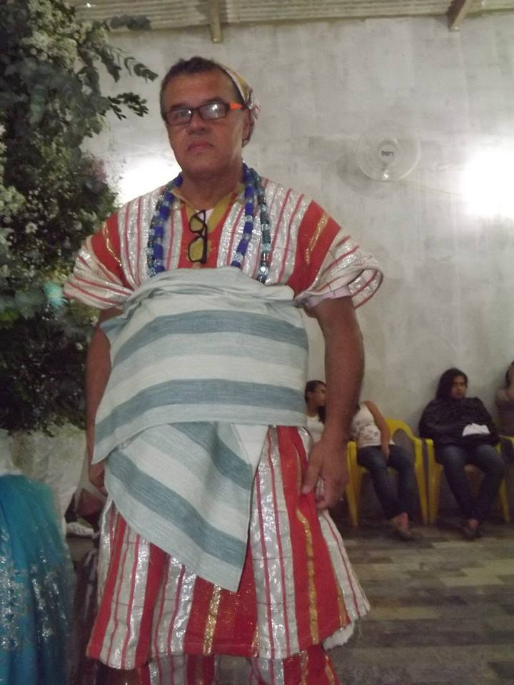 Pai Waldo de Oxossi